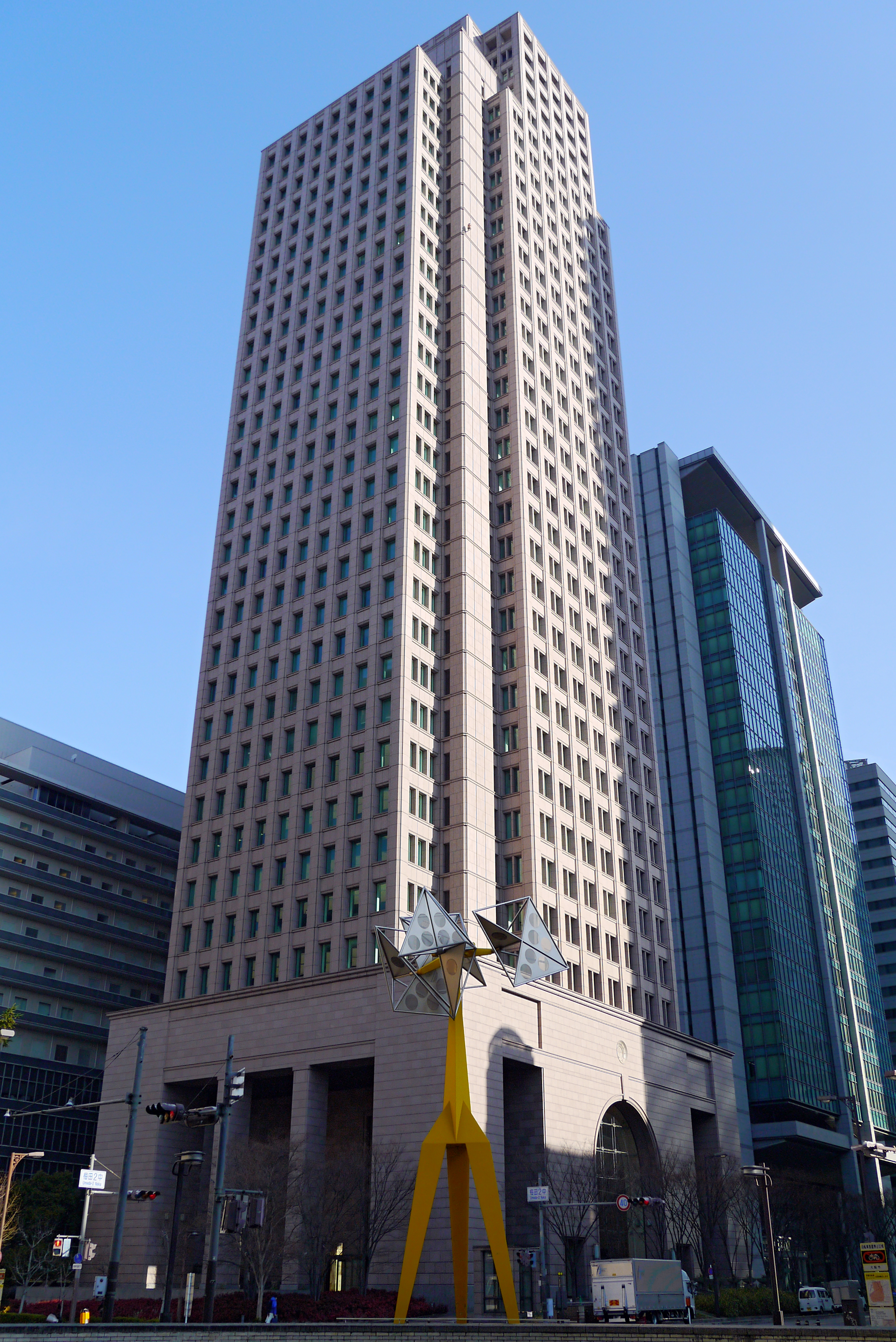 Meiji Yasuda Life Osaka Umeda Building (明治安田生命大阪梅田ビル), Osaka, Osaka prefecture, Japan